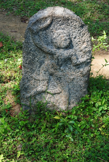 தச்சாம்பாடி குளக்கரை அருகே உள்ள நடுகல்